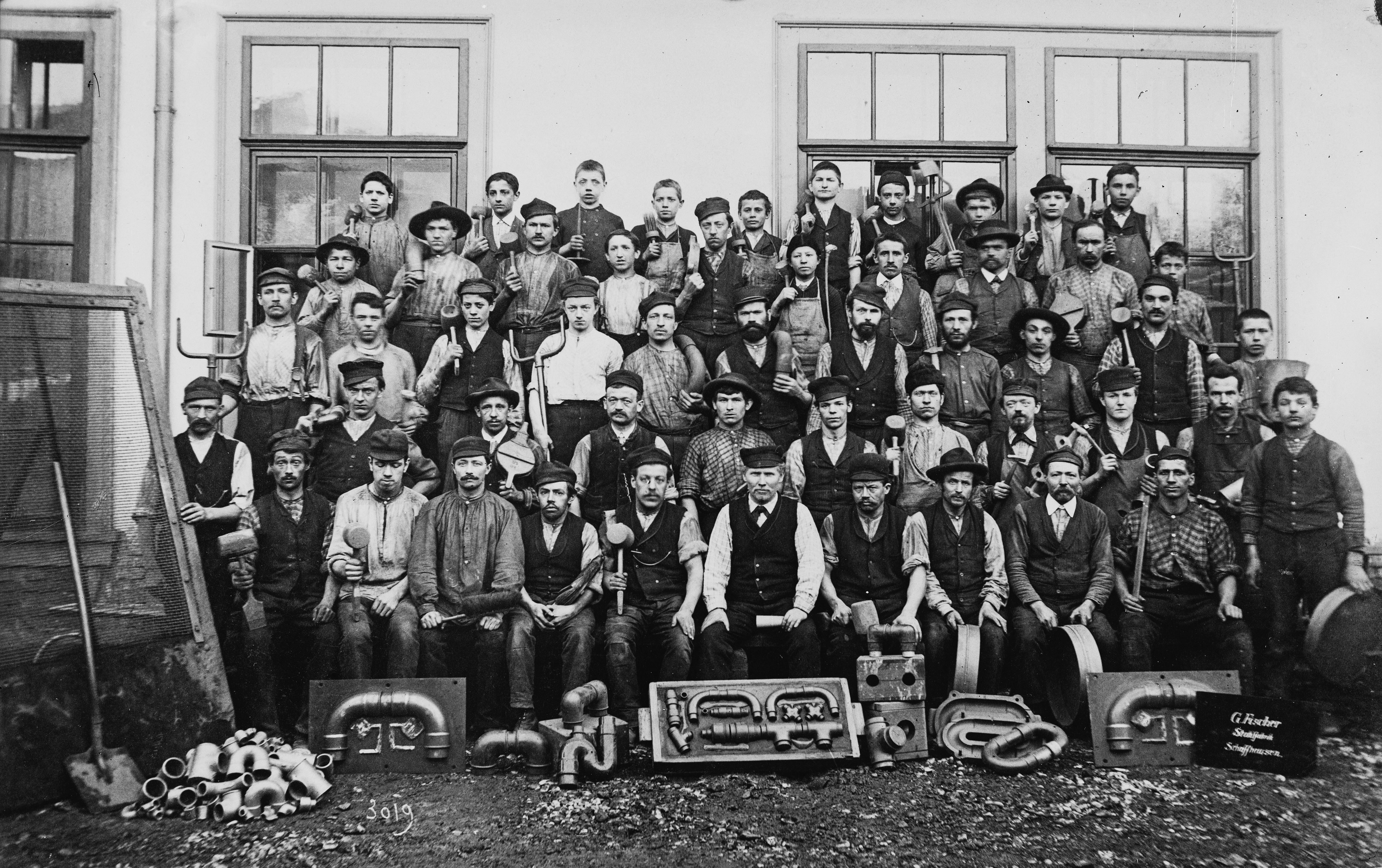 Belegschaft der Georg Fischer Fittinggiesserei Werk I, Fittings-Giesserei, vorderes Werk, 1943, Reproduktion eines Fotos von 1895 (Meister Roost mit seiner Giessereibelegschaft unter Georg Fischer III)